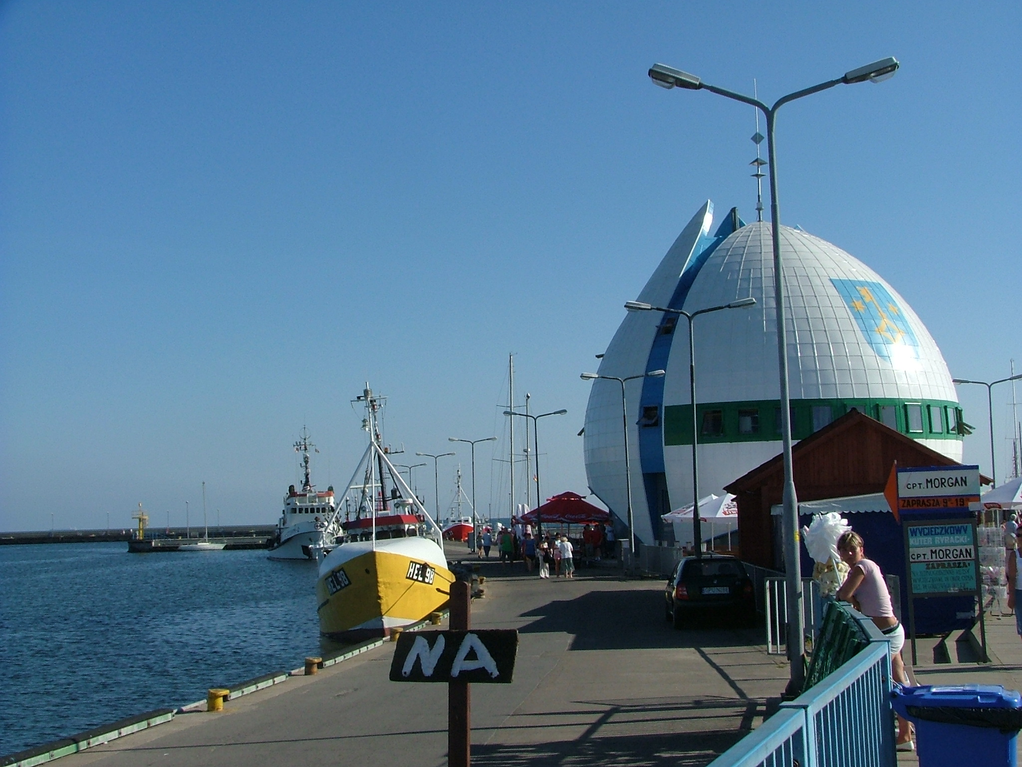 Hel, Poland